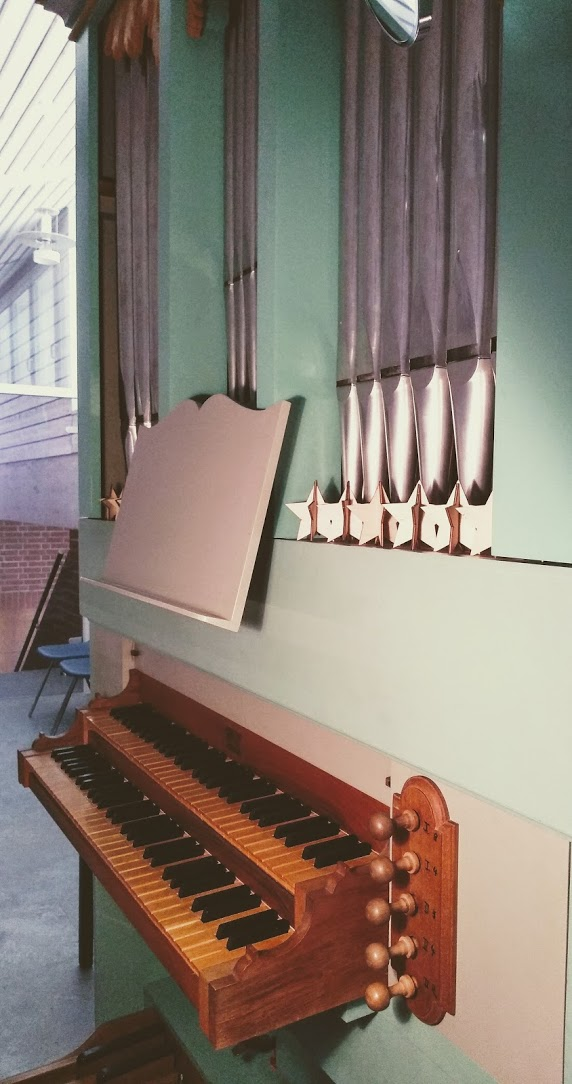 Frontseite der Pinchi-Orgel der Matthäus-Kirche in Bergtheim (Bayern/Deutschland)